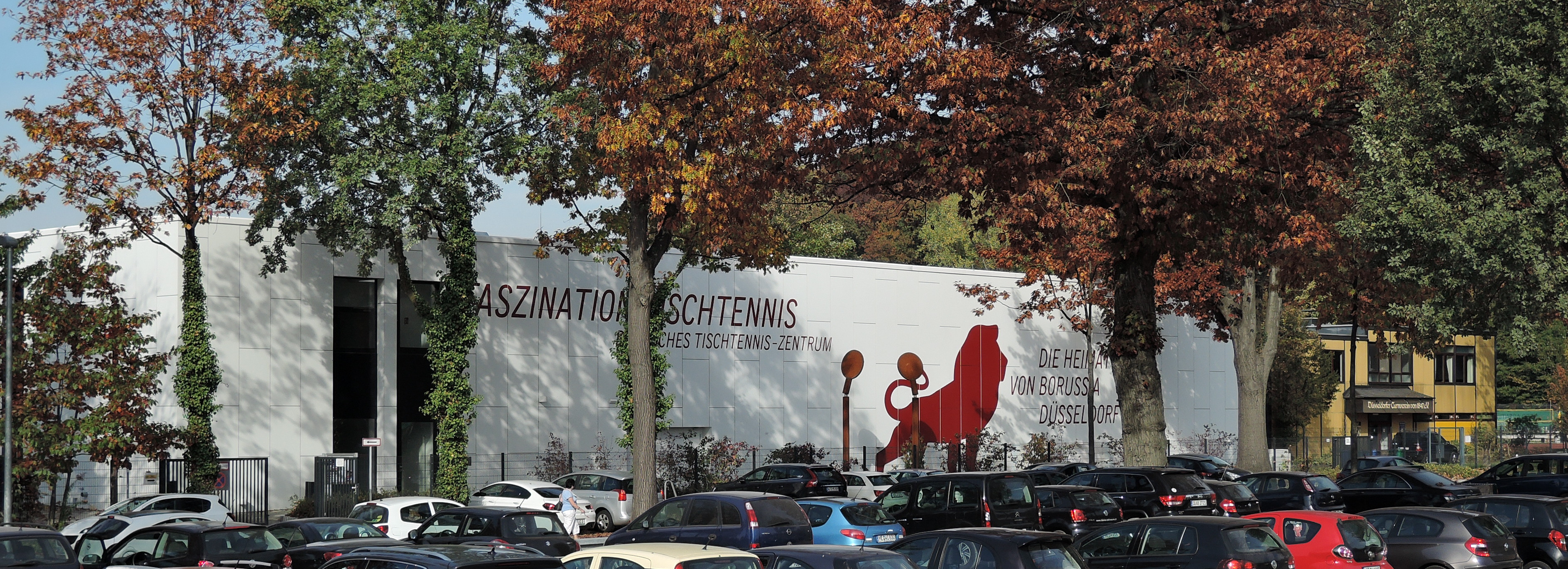 Gebäude "Deutsches Tischtennis-Zentrum" von Borussia Düsseldorf am Staufenplatz in Düsseldorf-Grafenberg